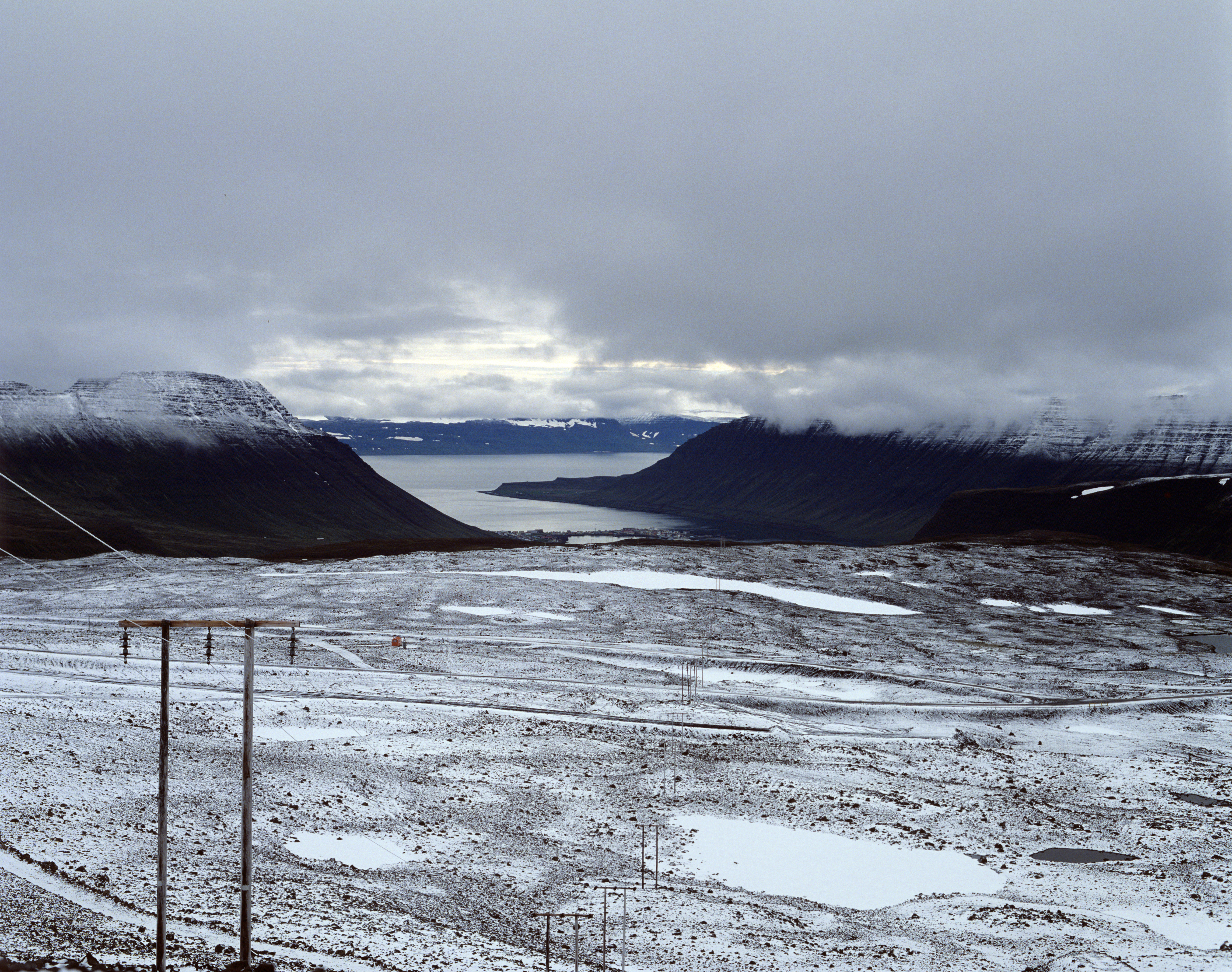 Breiðadalsheidi in Richtung Ömundarfjörður.